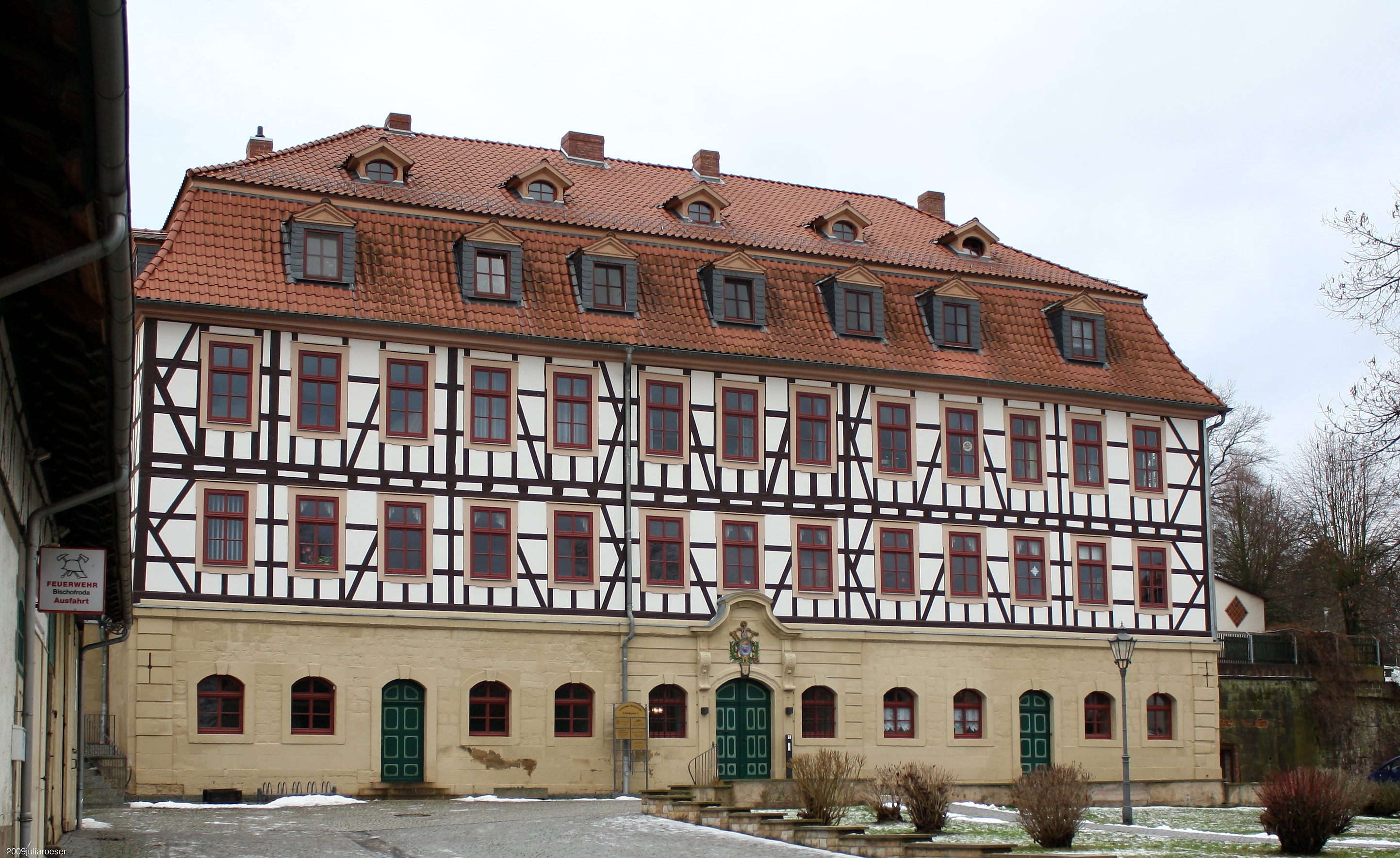 Bischofroda, Wartburgkreis